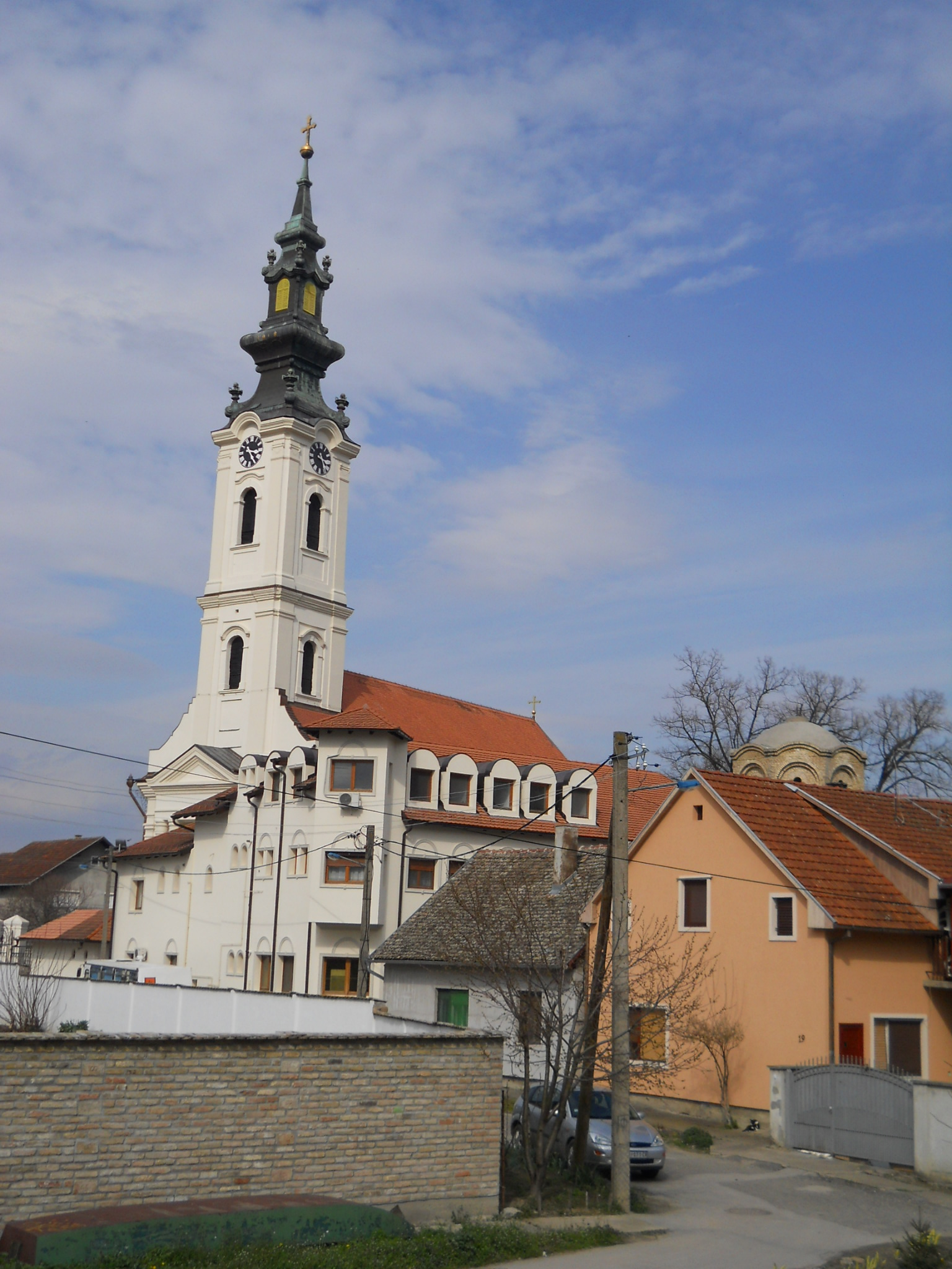 Futak - ortodox templom